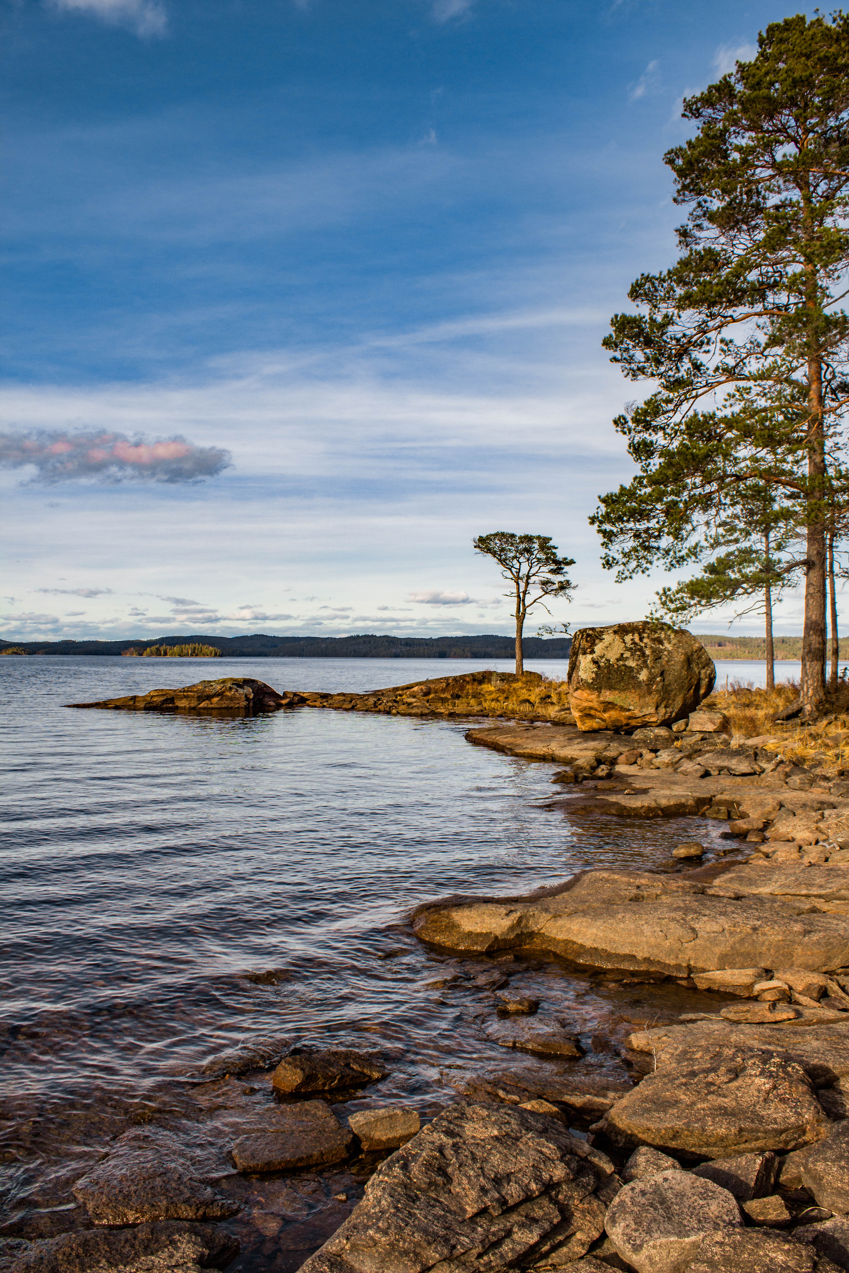 Stora Bör. En sjö mellan Årjäng och Säffle kommun.